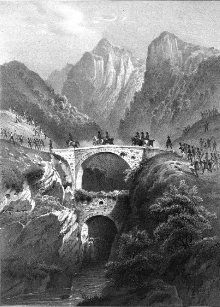 Album du Dauphiné - tome IV, litographie de Pont Haut, La Mure